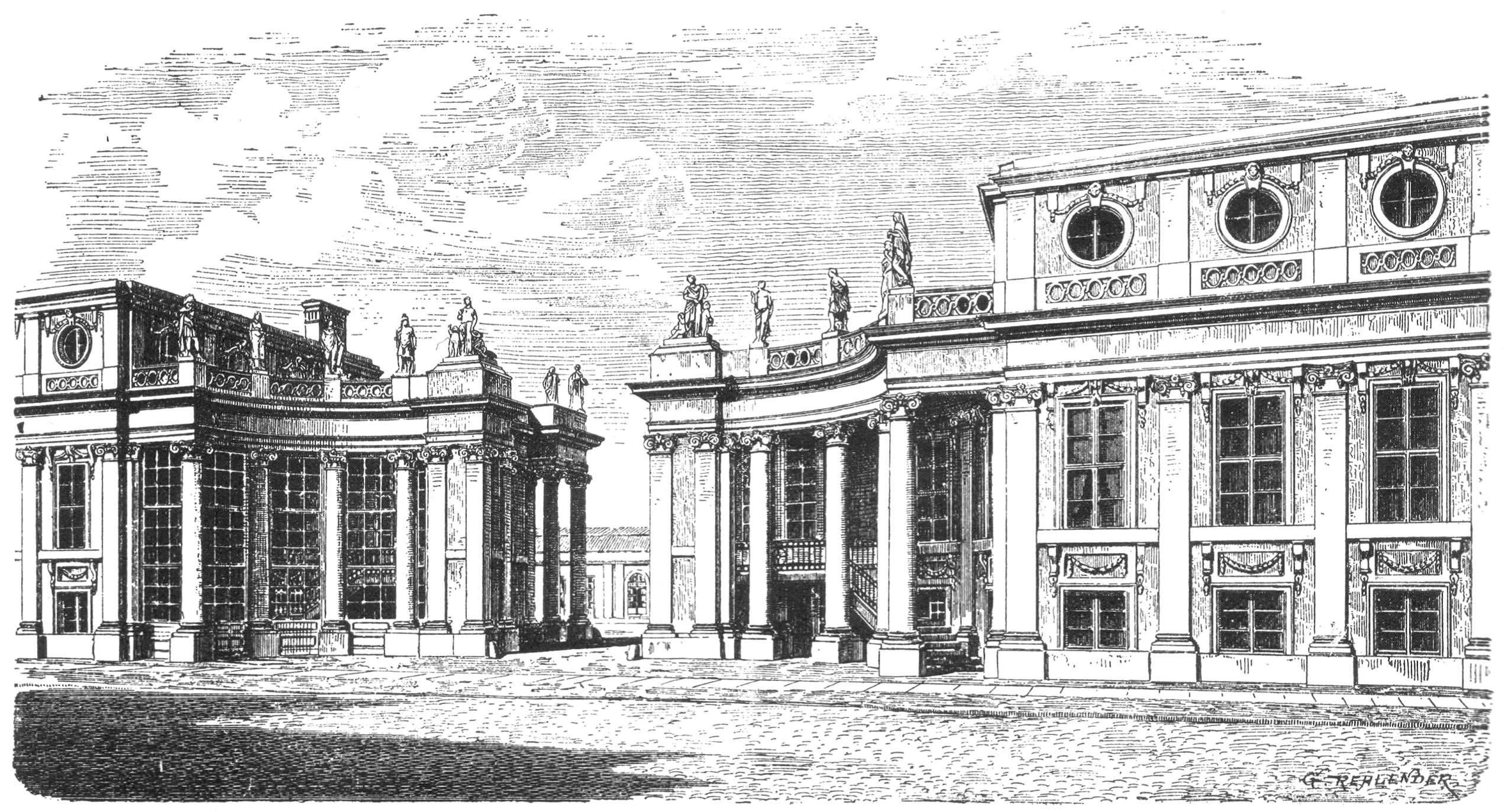 Berlin - Schloss Monbijou, Vordergebäude